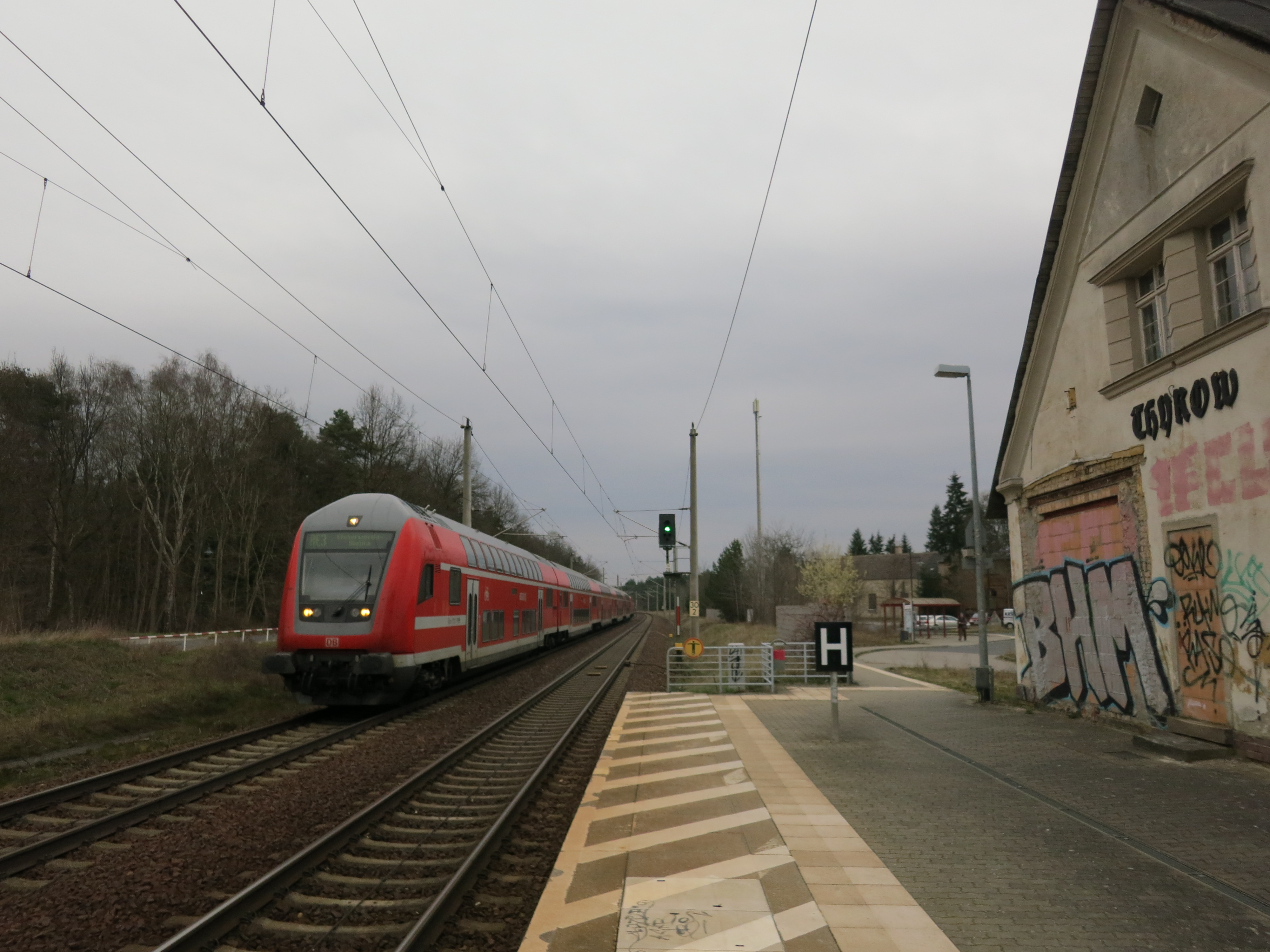 Bahnhof Thyrow, Bahnsteig, Blick nach Norden